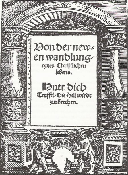 Titelseite der Neuen Wandlungen von Hans Hergot